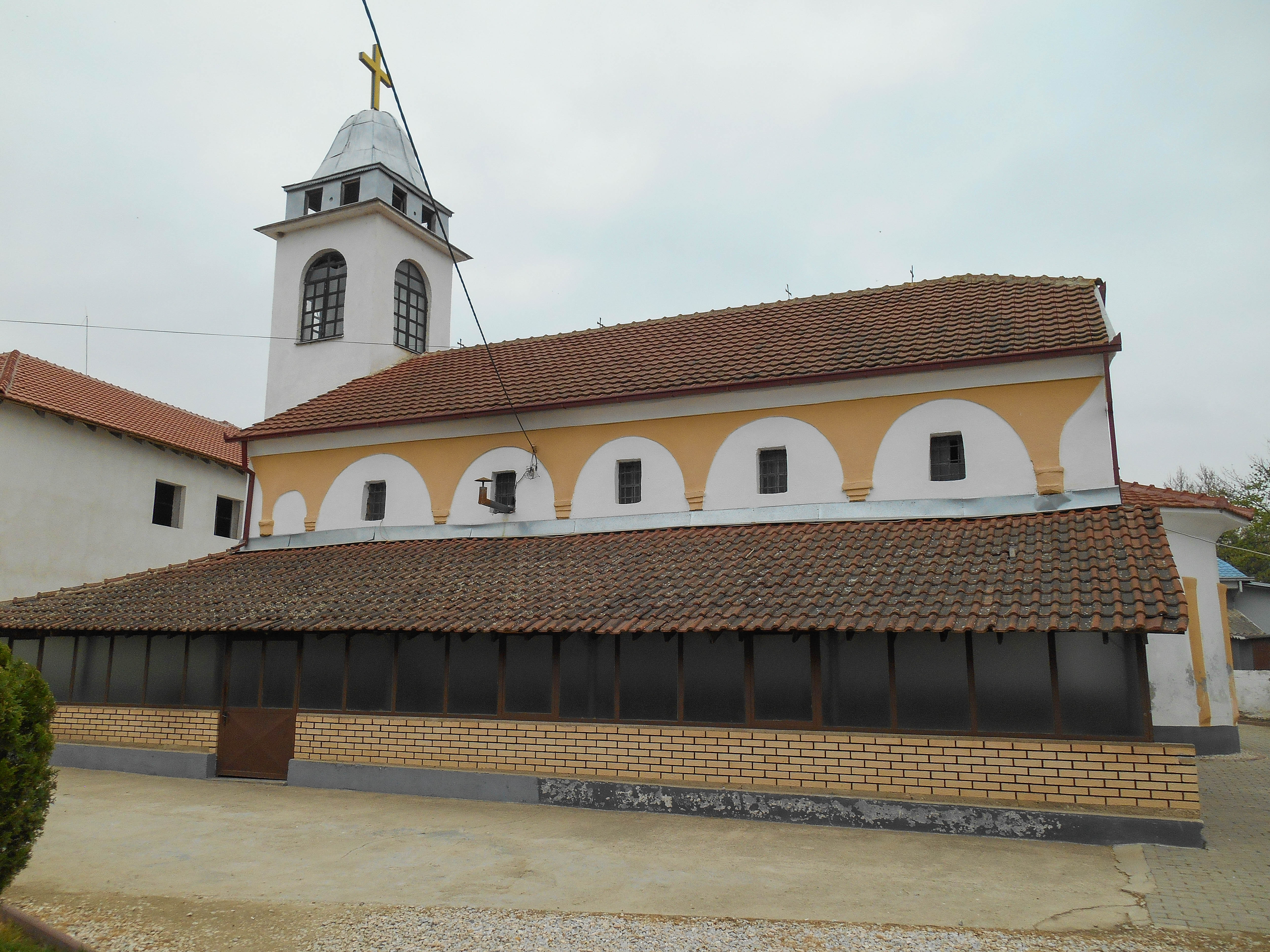 Црквата Света Троица - Давиље